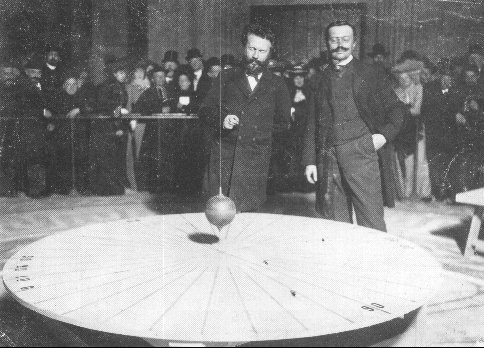 Reconstitution de l'expérience du pendule de Foucault par Camille Flammarion et Alphonse Berget le 22 octobre 1902